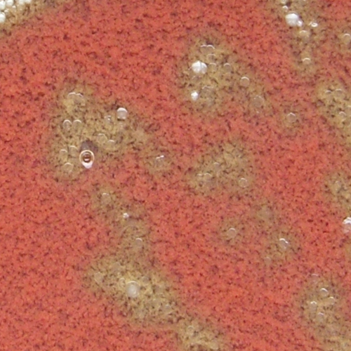 Alpha-Hämolyse auf Kochblutagar